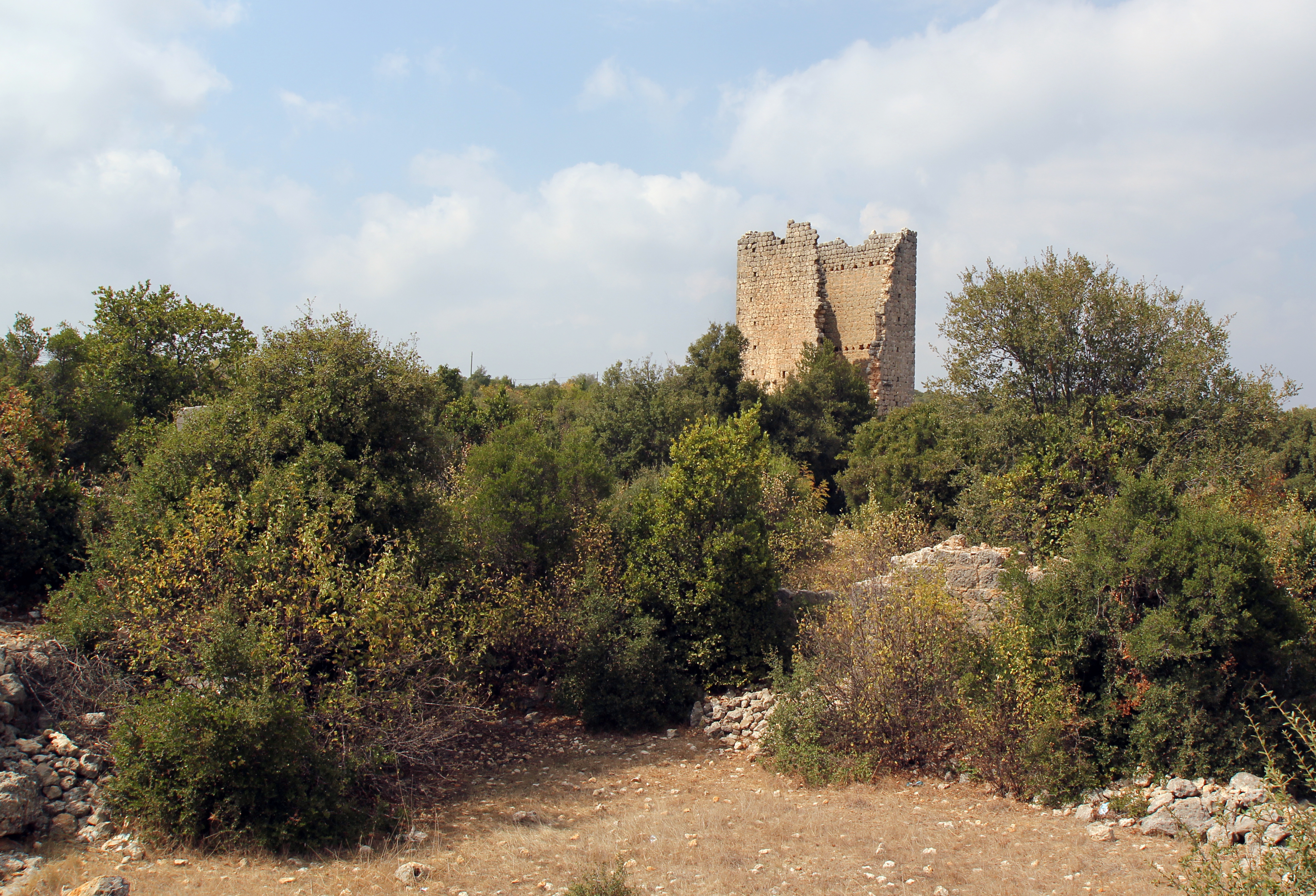 Gökburç, antiker Ort im rauen Kilikien nahe Silifke, Südtürkei, Turm eines Gehöfts